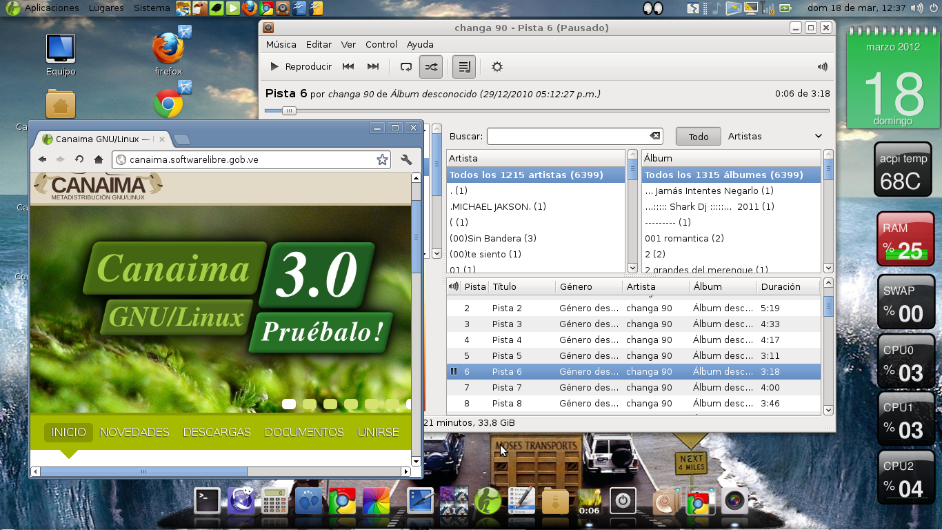 canaima 3.0 personalizado y con app del gestor de paquetes synaptic